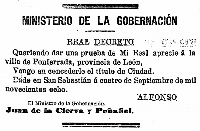 Real decreto por el que se concede el título de Ciudad a la hasta entonces villa de Ponferrada, recogido en la Gaceta de Madrid el 7 de septiembre de 1908